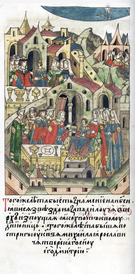 ЛИЦЕВОЙ ЛЕТОПИСНЫЙ СВОД В том же году было знамение на небесах: явилась звезда на западе лучами вверх, испуская словно хвост к полудню вниз. В том же году были пустриги у князя Михаила Ярославича Тверского сыну его Дмитрию.